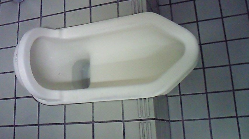 伊豆急行100系車内のトイレ